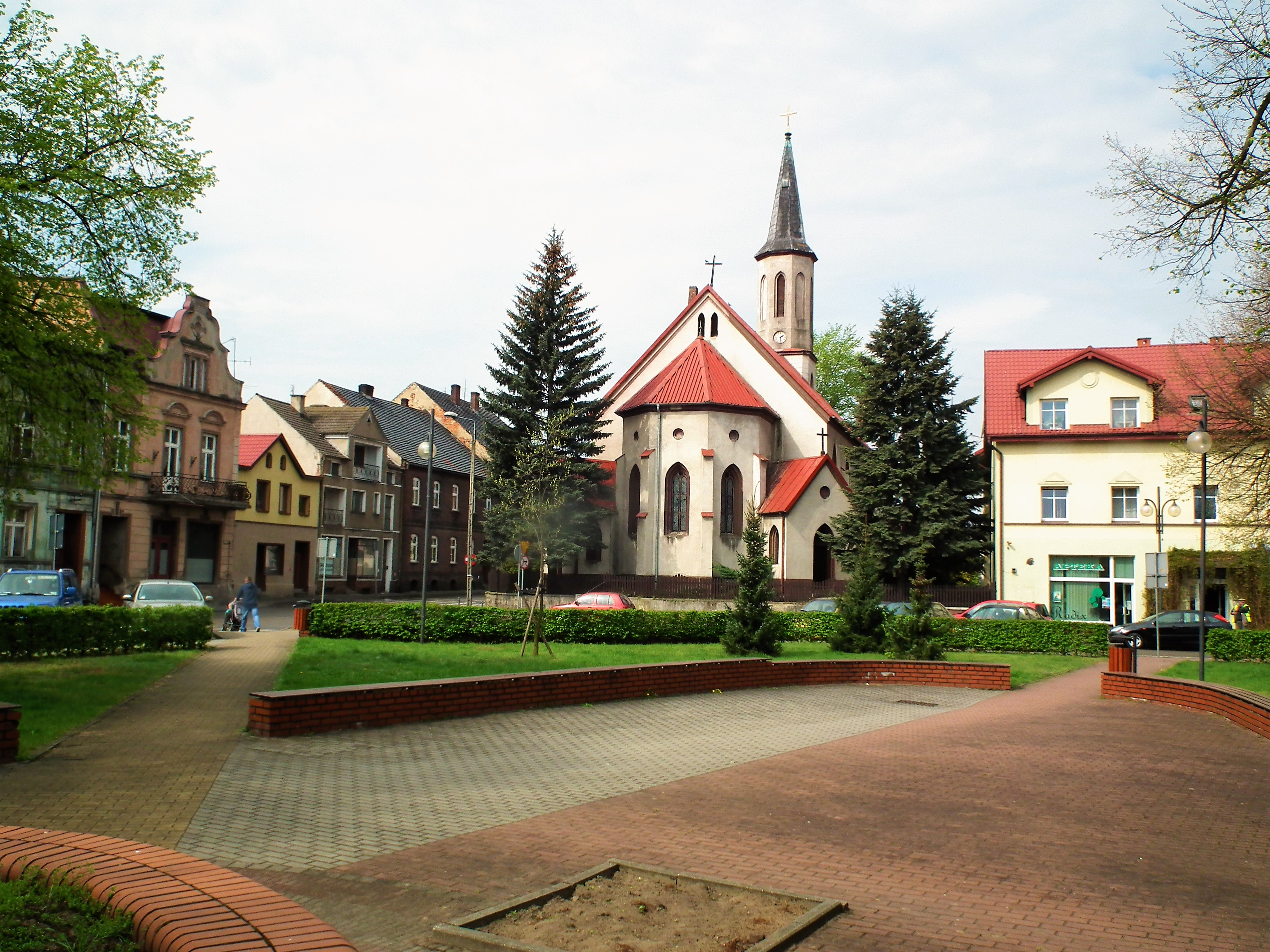 Rynek w Gorzowie Śląskim.